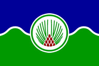 Flagge der Gemeinde Bor und der Stadt Bor